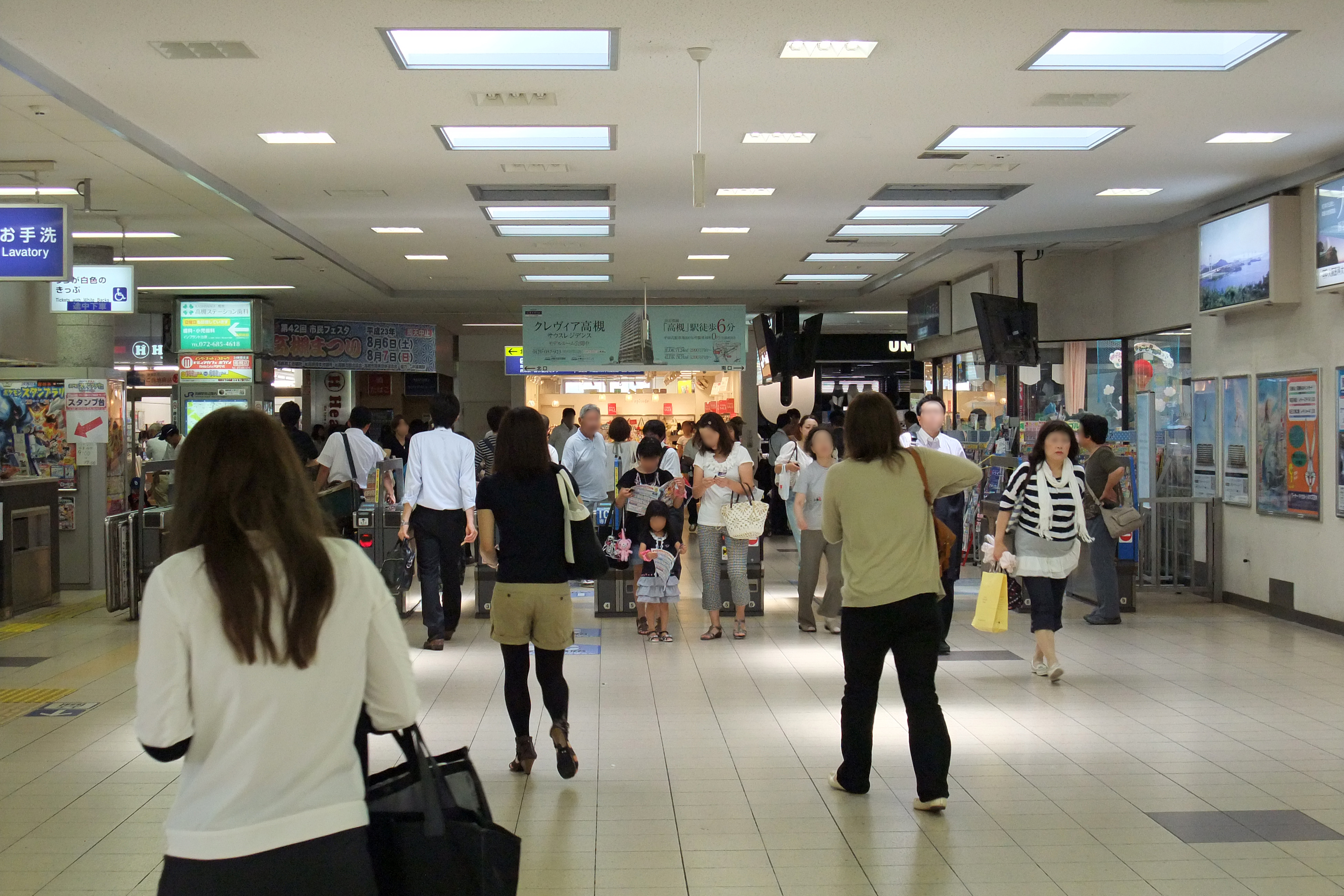 Takatsuki Station in Takatsuki, Osaka prefecture, Japan